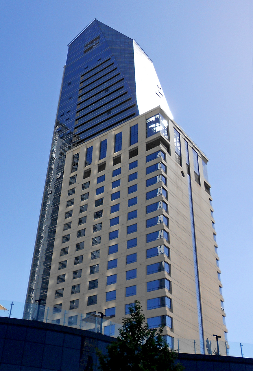 Contrafrente de la torre del Alvear Icon Hotel, en Puerto Madero.